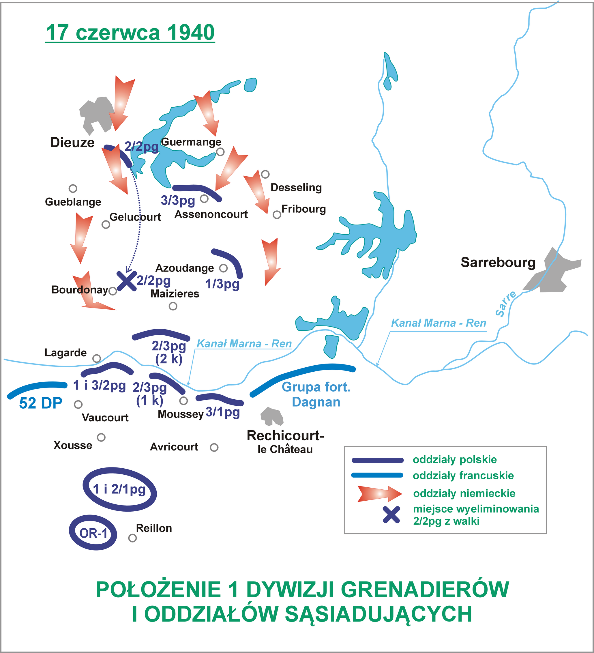 Położenie 1 Dywizji Grenadierów 17 czerwca 1940